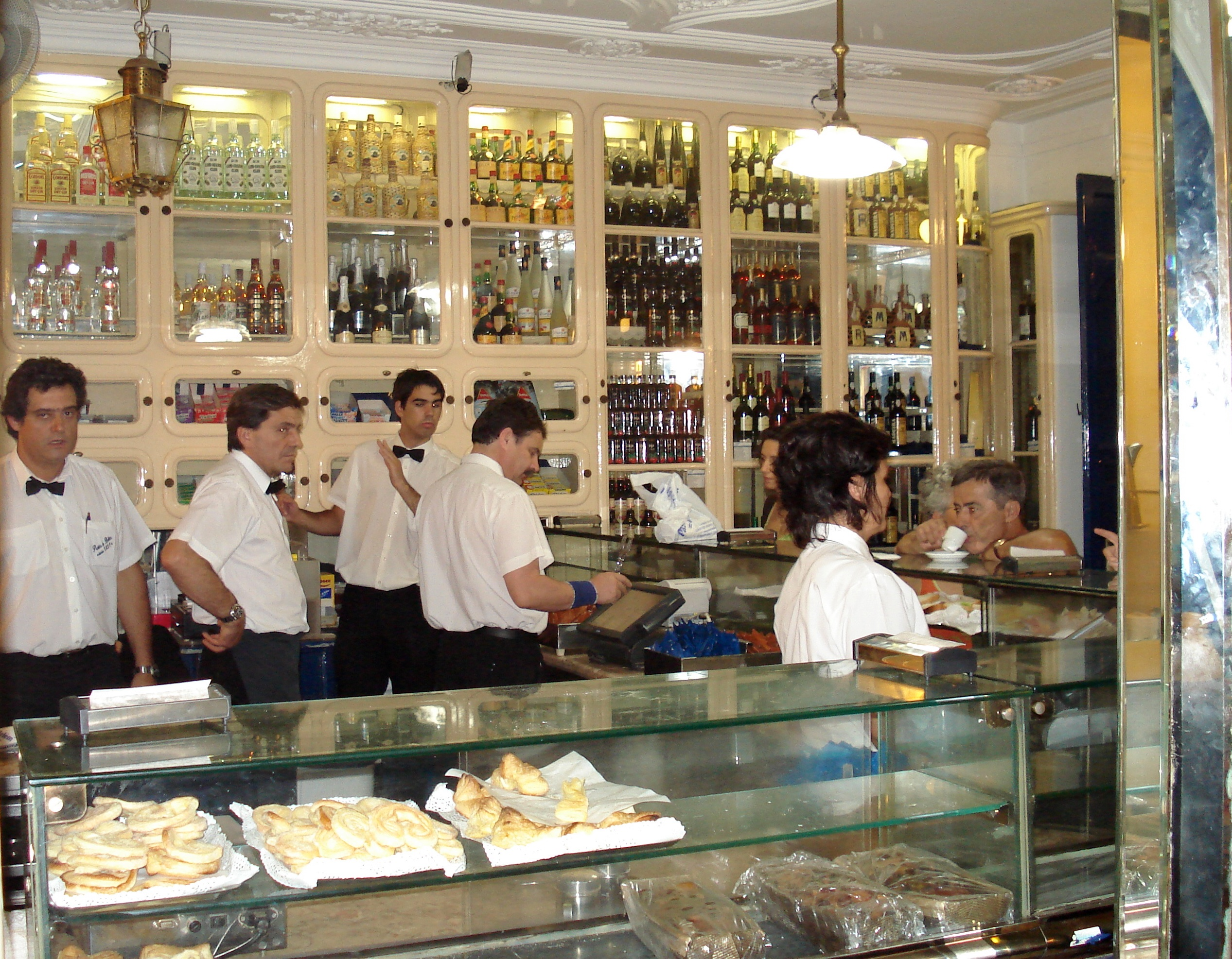 Eine bereits 1837 gegründete Pastelaria mit historischer Einrichtung